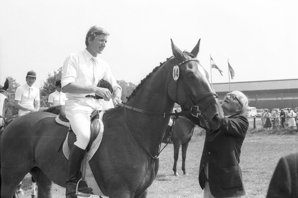 Vielseitigkeitsturnier für Pferde auf dem Gelände an der Olshausenstraße 65-67. Im Bild der Bundestrainer der Vielseitigkeitsreiter Max Habel (rechts) gratuliert Herbert Blöcker auf "Marlandus" zum Sieg.